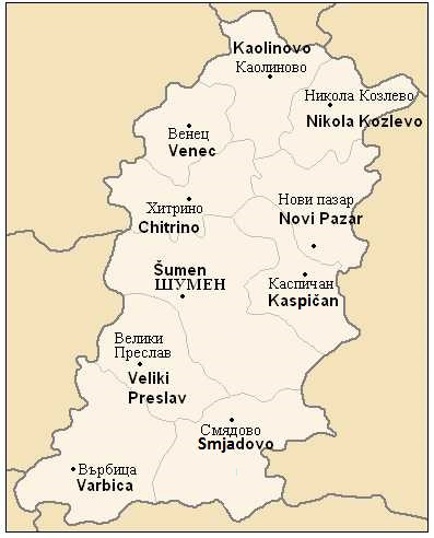 Šumen-okolí